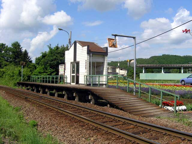 北美瑛駅全景 撮影場所 北美瑛駅そば線路わきより。 撮影者によるGFDLリリース